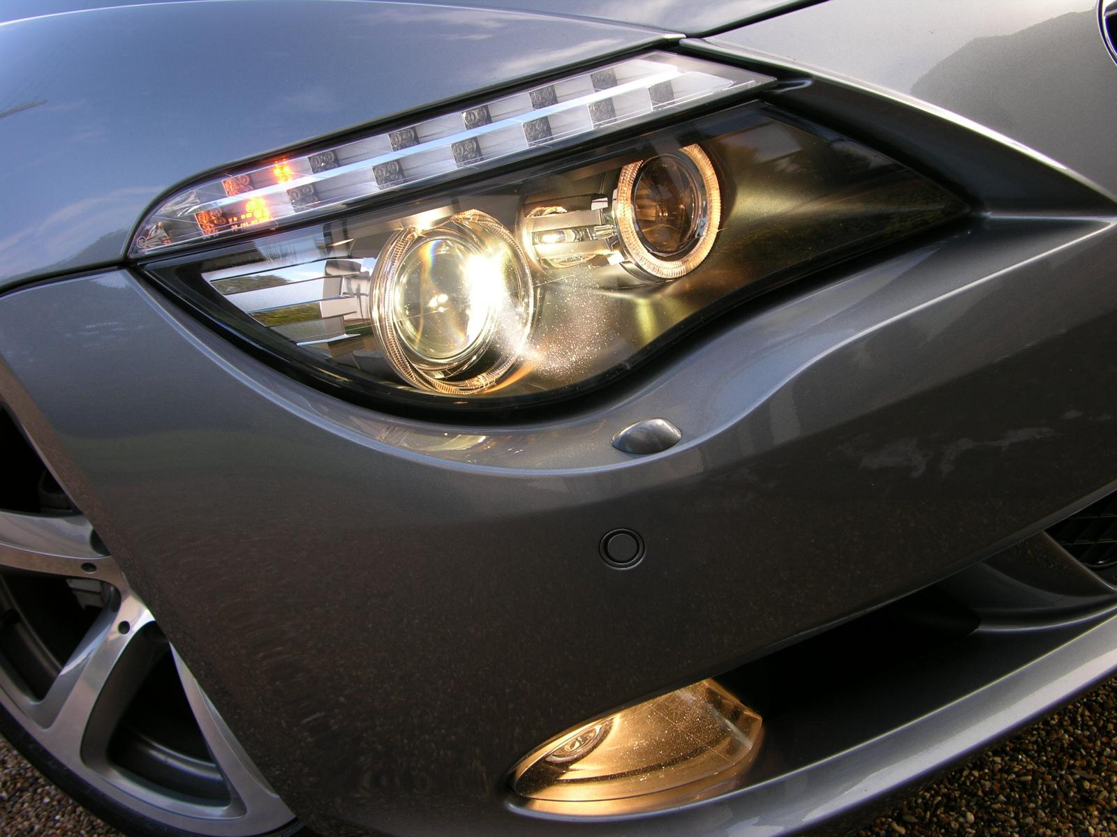 2007 BMW 635d Sport